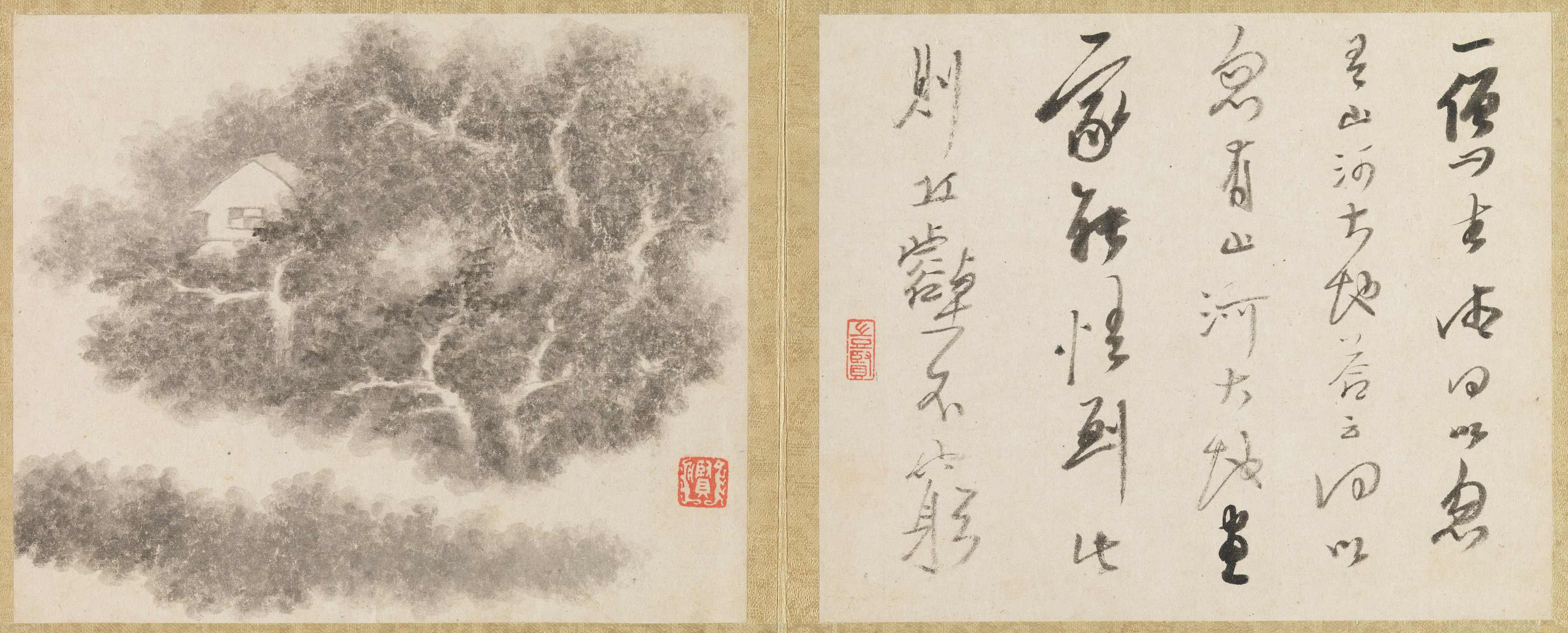 China; Album; Paintings